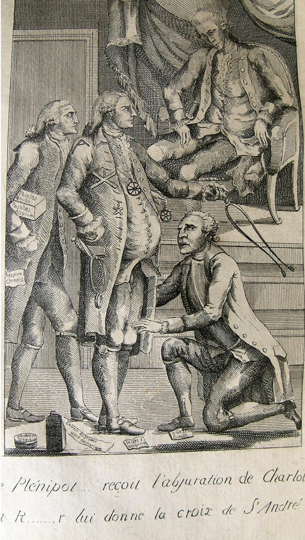 Frontispice du libelle Le Diable dans un bénitier (1784) in-octo d'Anne-Gédéon La Fite de Pellepore. Gravure satirique : « Le Plénipot…[Plénipotentiaire, comte de Moustier] reçoit l’abjuration de Charlot [Charles Théveneau de Morande, à genoux] et R….r [Receveur, inspecteur de la police de Paris] lui donne la croix de Saint André. ». Le personnage qui se tient derrière Receveur est probablement Ange Goudar, un feuillet avec l'inscription Espion chinois sort de sa poche. Sous son bras, une boîte avec les inscriptions "phiolle d'oubli" et "pastilles d'opium". Au sol, flacon avec l'inscription, "Extrait du serpent noir d'Amérique". Au sol un exemplaire du "Grec découvert" pour désigner l'ouvrage de Goudar "L'Histoire des Grecs ou de ceux qui corrigent la fortune au jeu". Sous le talon de Morande, un exemplaire du "Gazetier Cuirassé".